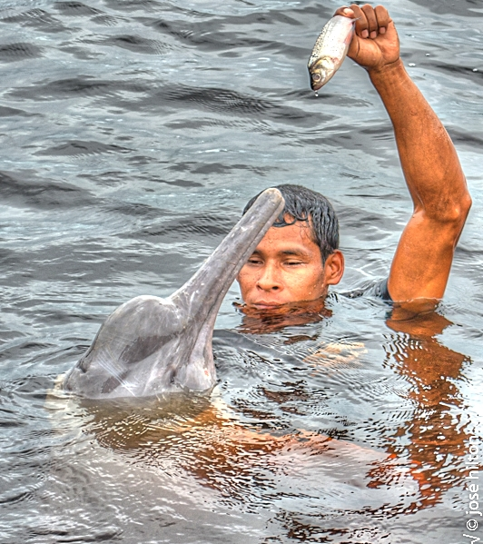 Boto vermelho e seu encantador